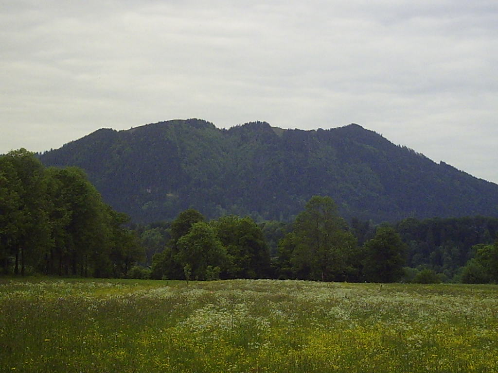 Heiglkopf (ehem. Hitler-Berg), Wackersberger Höhe (ehem. Hindenburg-Höhe) und Blomberg